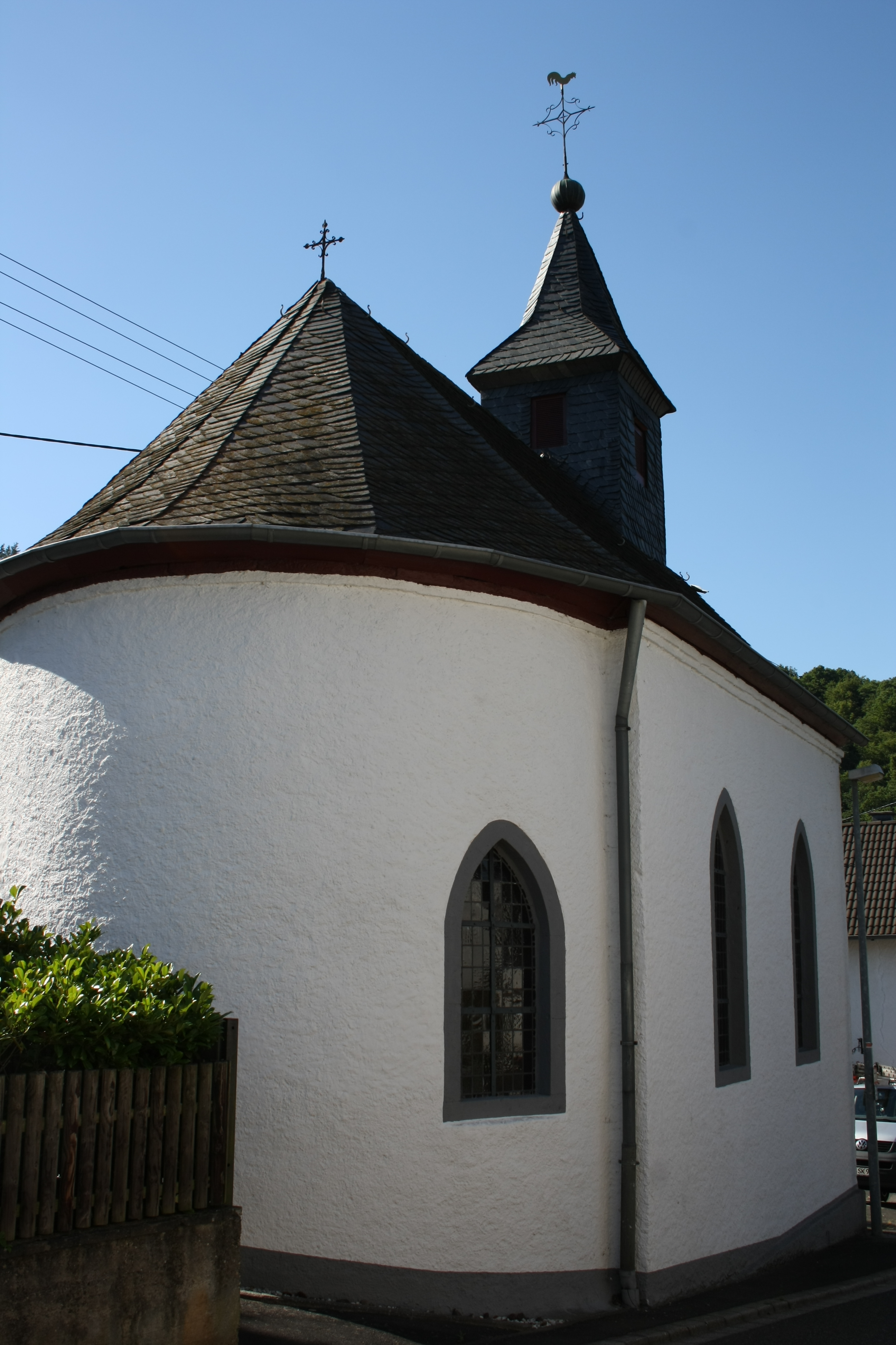 katholische Filialkirche St. Josef in Fuchshofen, Außenaufnahme